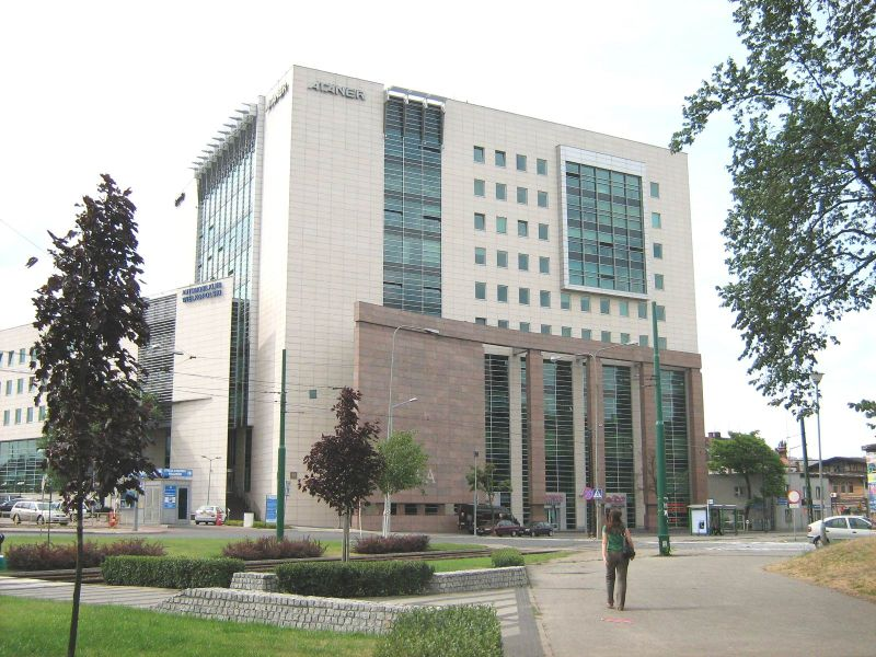 Akademia Ekonomiczna